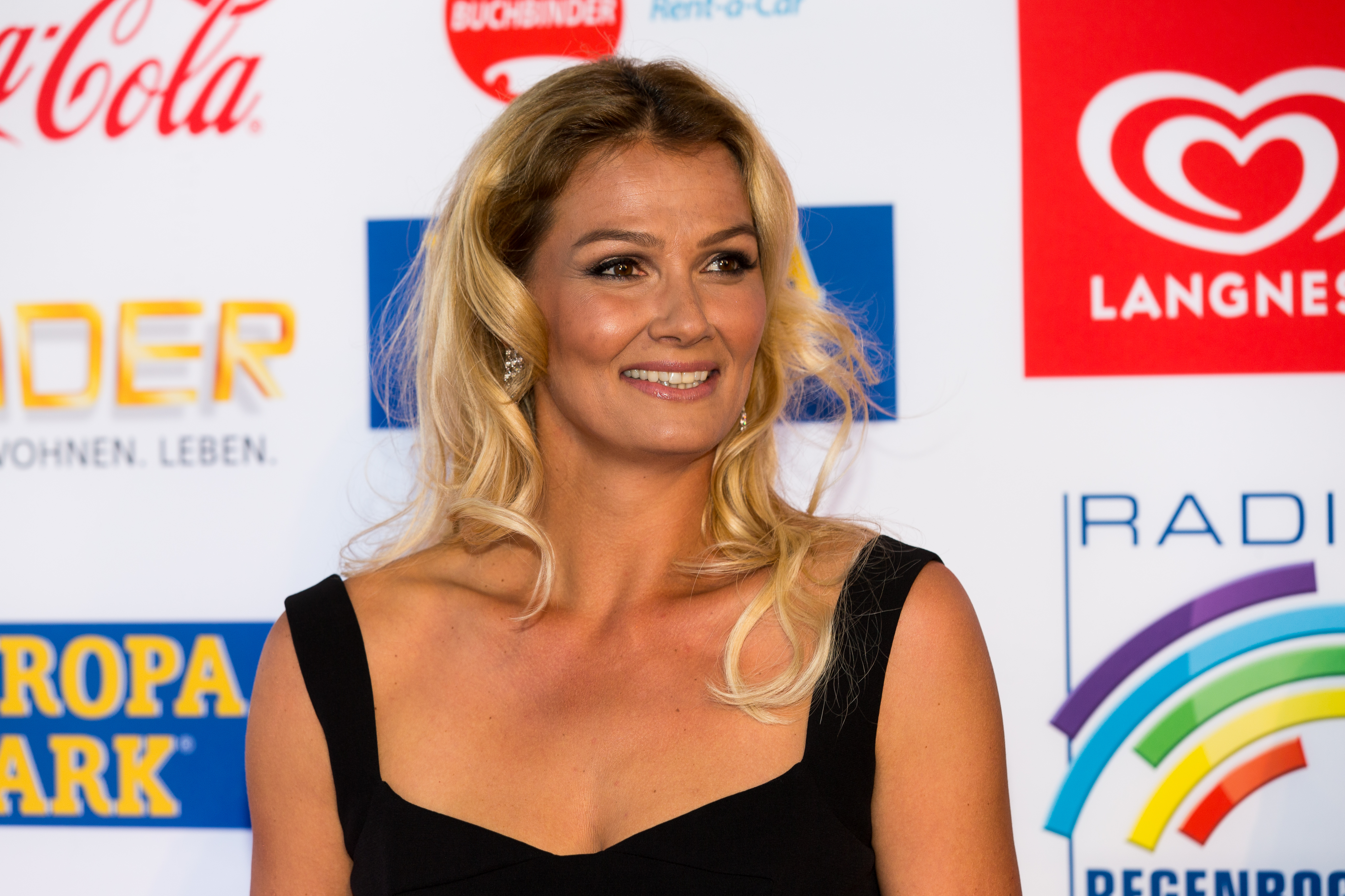 during Radio Regenbogen Award 2017 at Europapark, Rust, Baden-Württemberg, Germany on 2017-04-07, Photo: Sven Mandel